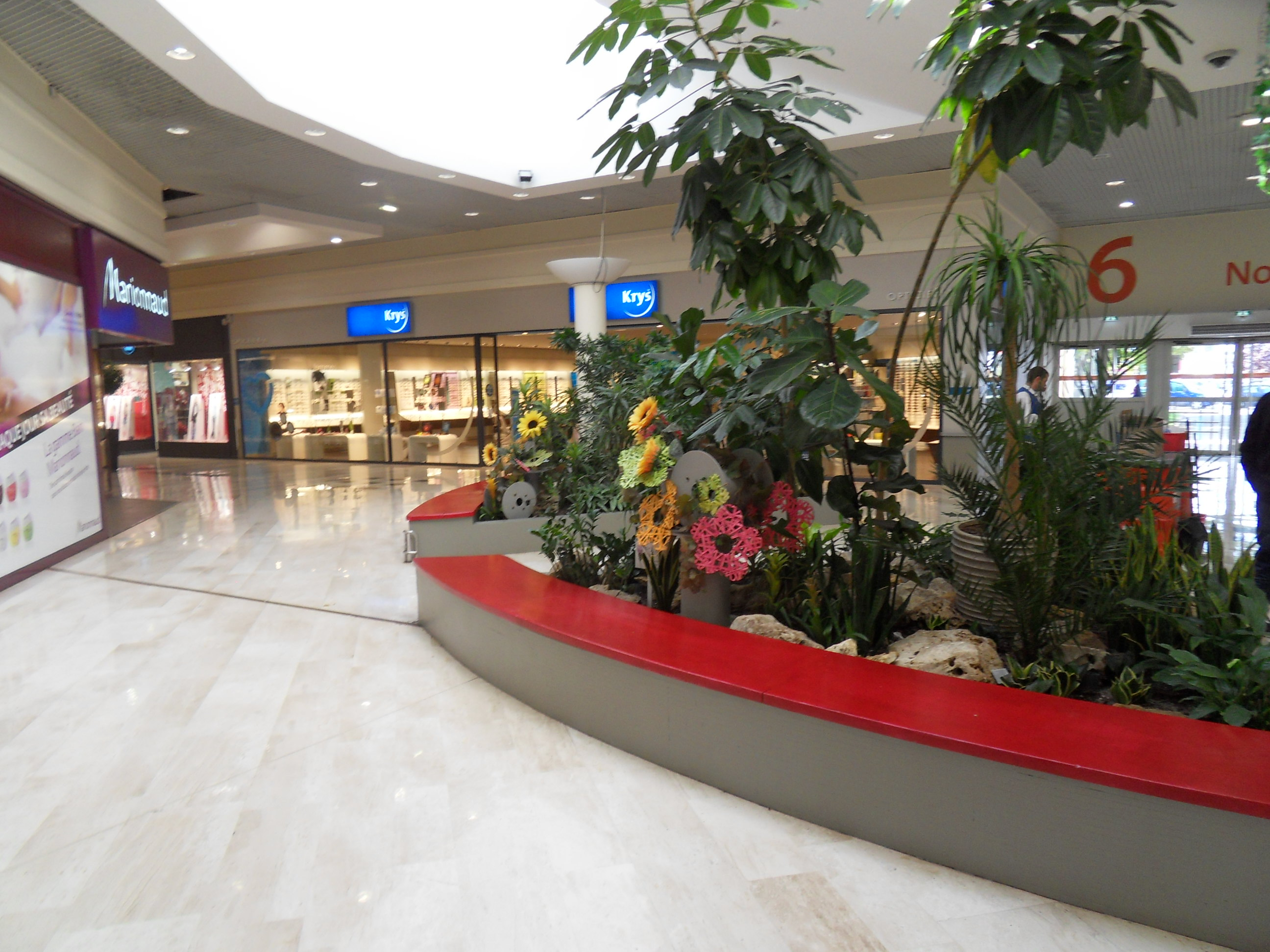 Photo prise à l'intérireur du Centre Commercial Tourville-la-Rivière.